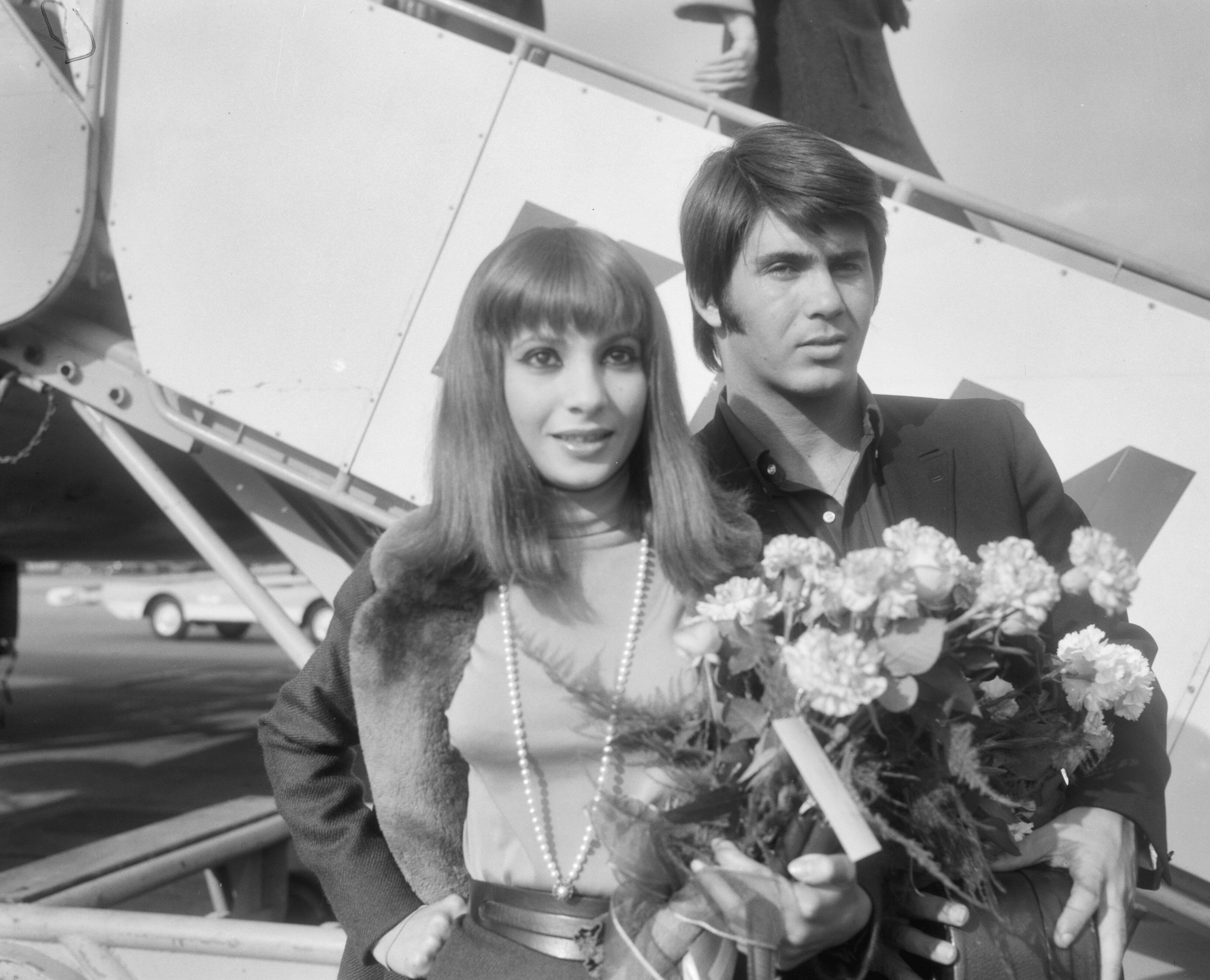 Collectie / Archief : Fotocollectie Anefo Reportage / Serie : Het Israëlische zang duo Abraham en Esther Ofarim tijdens hun persconferentie bij aankomst op Schiphol Beschrijving : Het duo aan de vliegtuigtrap Datum : 9 september 1966 Locatie : Noord-Holland, Schiphol Trefwoorden : muziek, perconferenties, portretten, zangeressen, zangers Persoonsnaam : Ofarim, Abraham, Ofarim, Esther Fotograaf : Bilsen, Joop van / Anefo Auteursrechthebbende : Nationaal Archief Materiaalsoort : Negatief (zwart/wit) Nummer archiefinventaris : bekijk toegang 2.24.01.04 Bestanddeelnummer : 919-5465